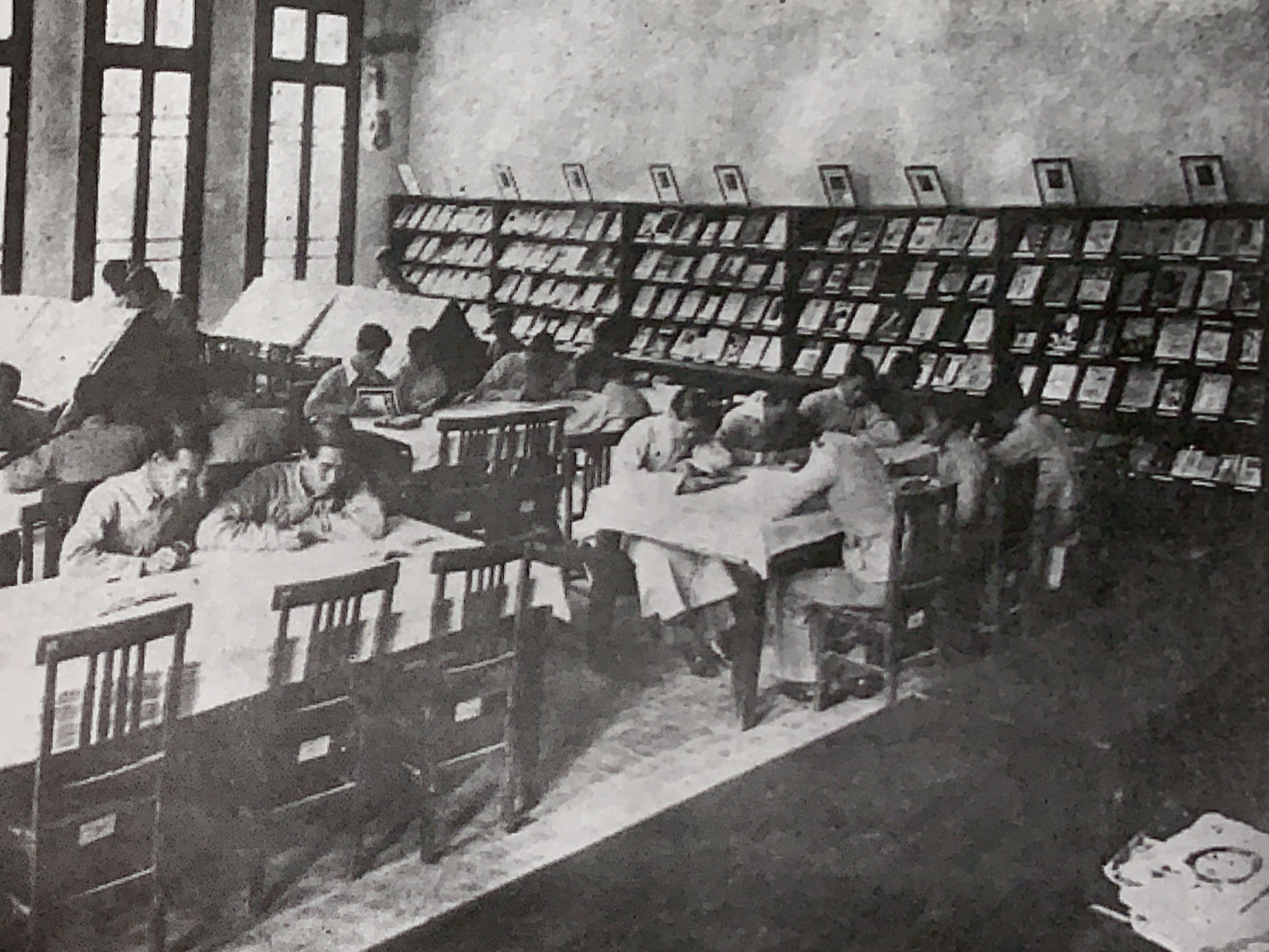 20世纪30年代的广州市立第二中学图书馆